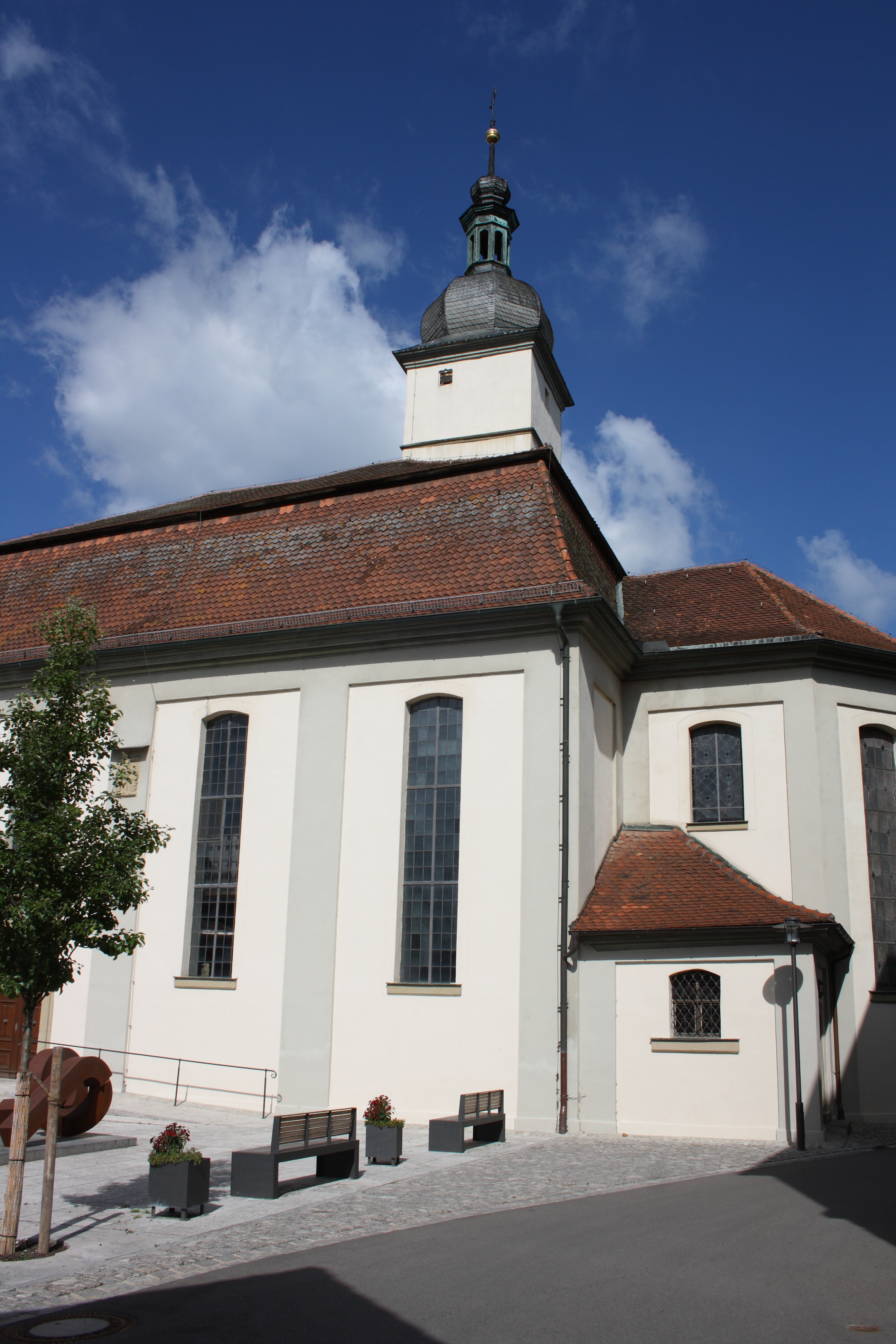 Evangelische Kirche in Mainbernheim im Landkreis Kitzingen (Bayern)